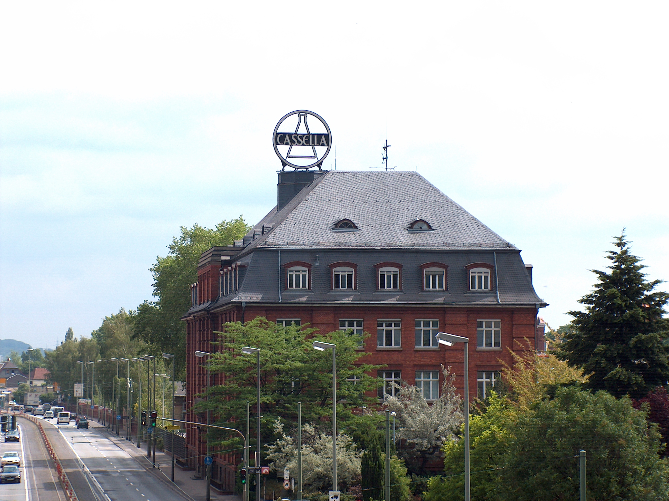 Hauptgebäude der ehem. Cassella; Blick von Westen; mit Leuchtreklame, Gründerfamilie Gans